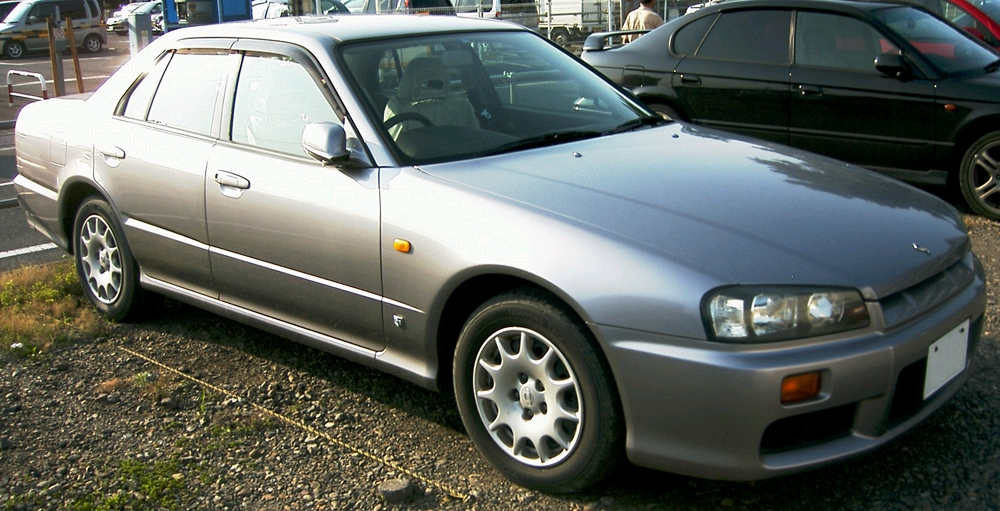 “Nissan_Skyline_R34” Image:Nissan_Skyline_R34_b.jpg Image:Nissan_Skyline_R34_c.jpg Category:Nissan Skyline R34